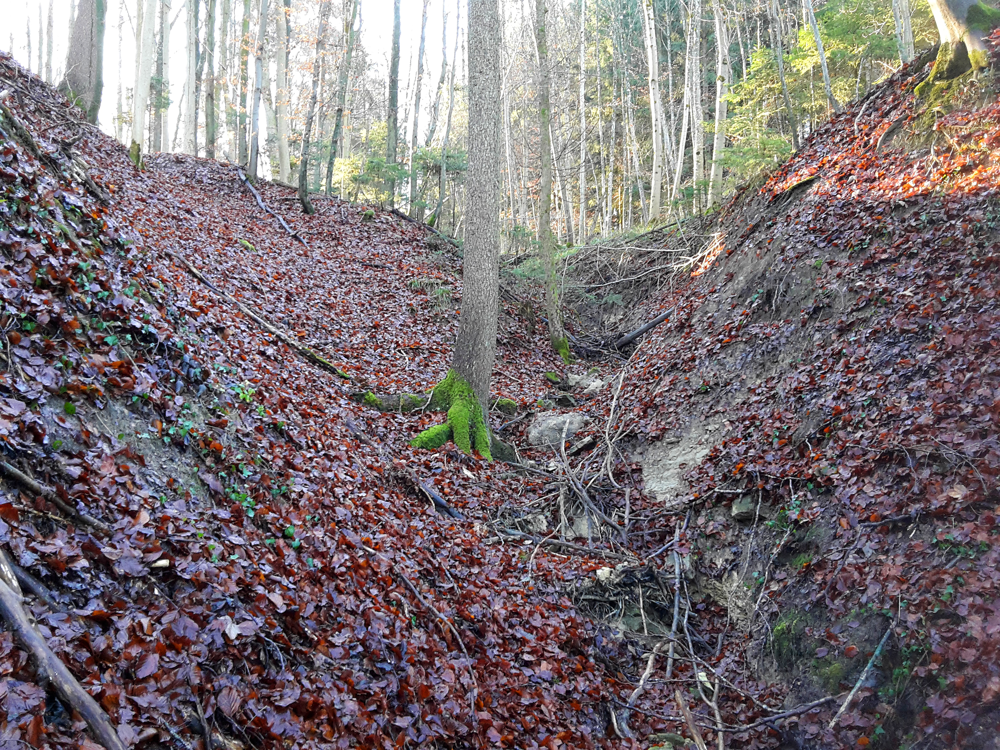 Lochmattbächli im Gebiet Oberwiler Gruehalden bei der Unterquerung einer Waldstrasse